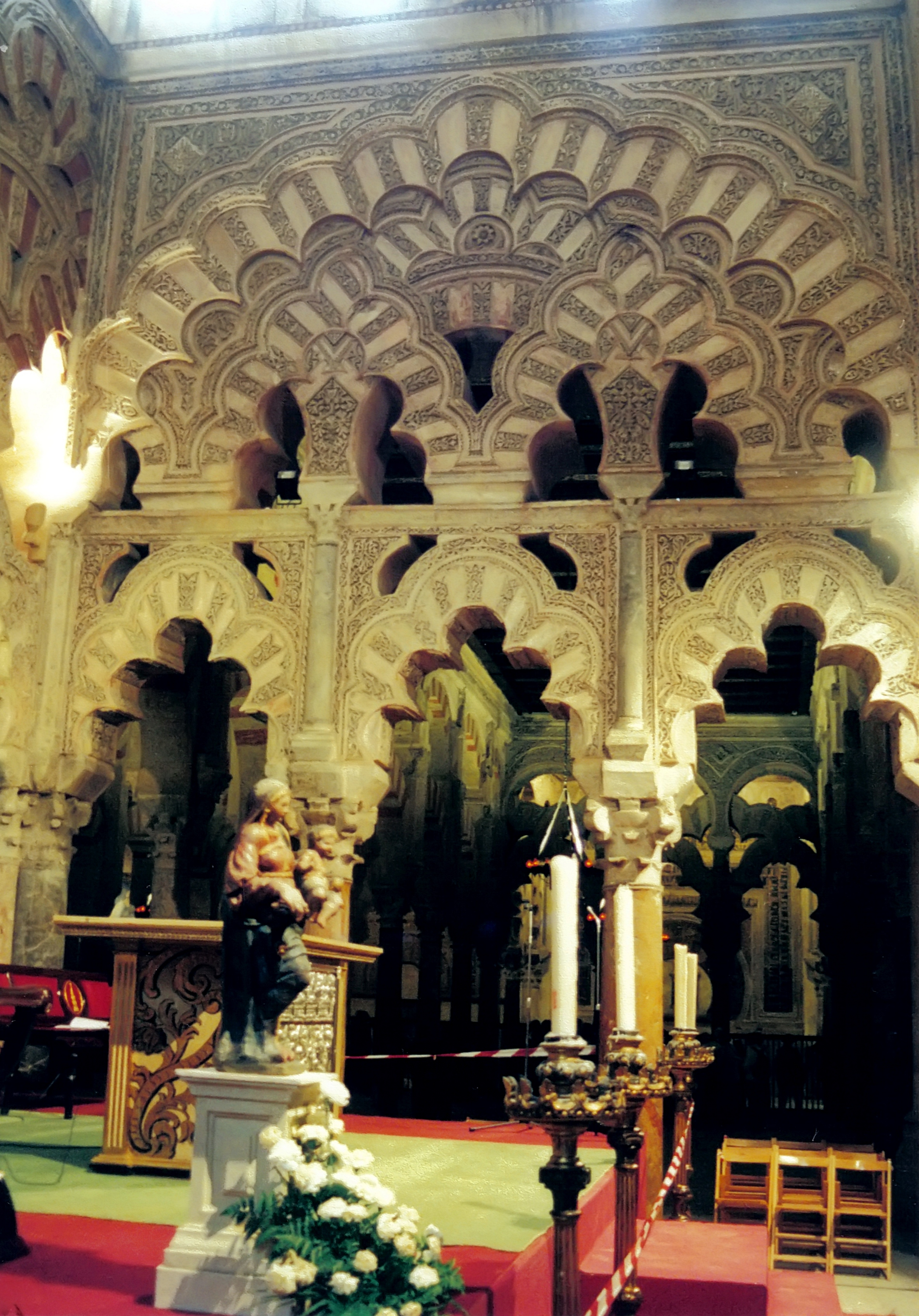 Cordoue - Mosquée - Chapelle de Villaviciosa : arcs polylobés entrecroisés